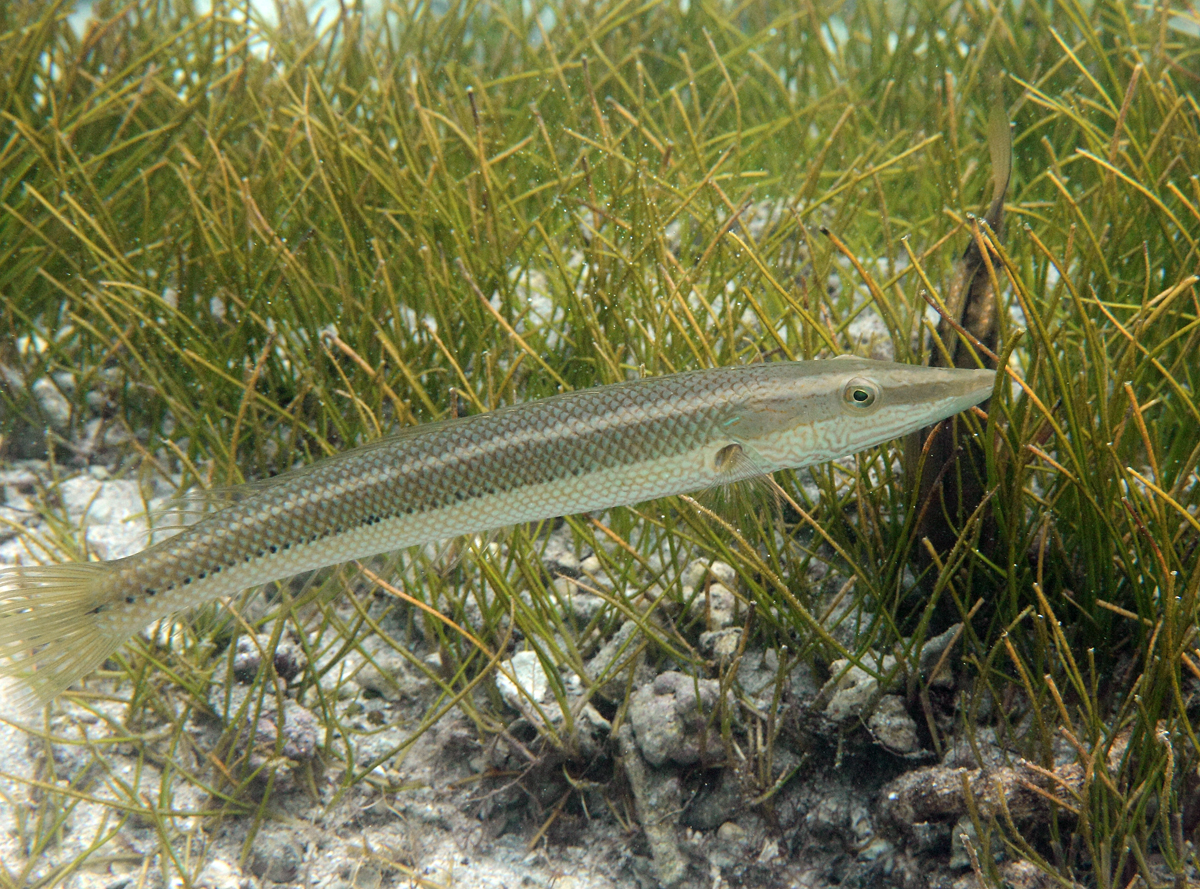 Une longue girelle (Cheilio inermis) à la Réunion.